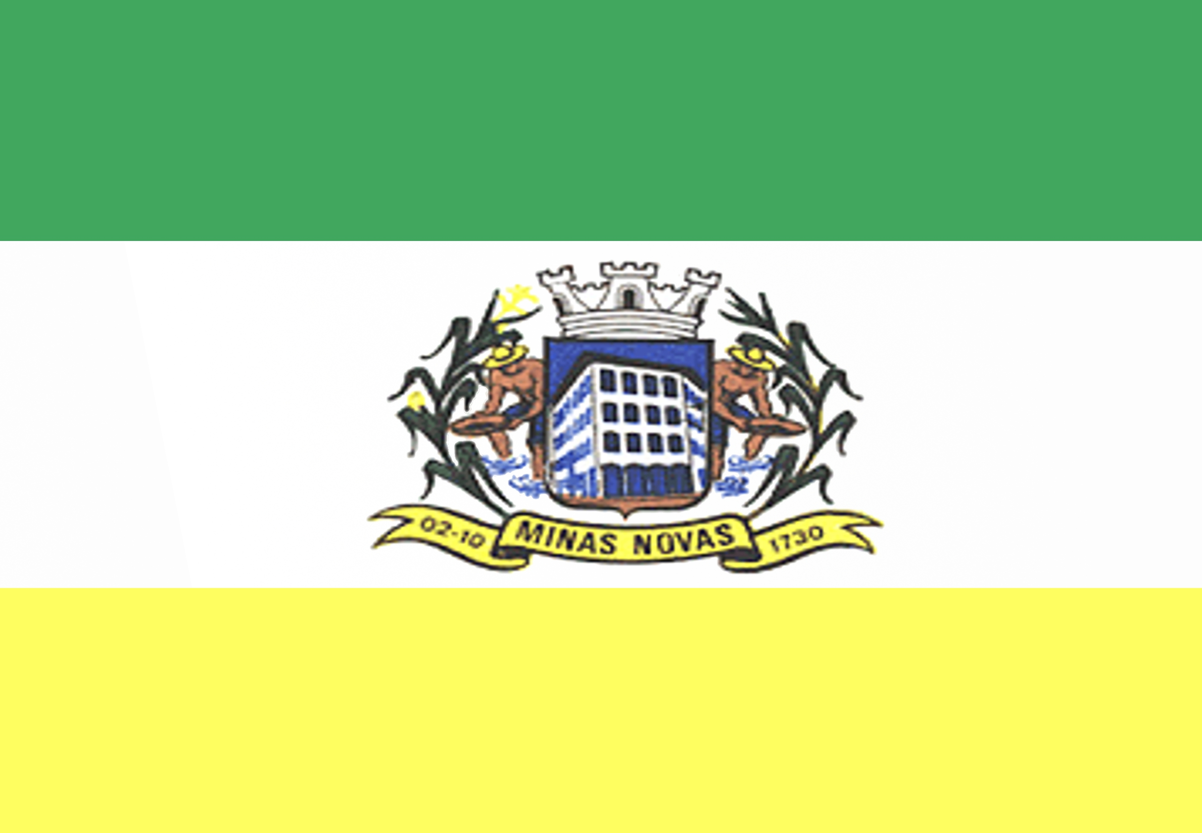 esta imagem representa a a bandeira da cidade de Minas Novas